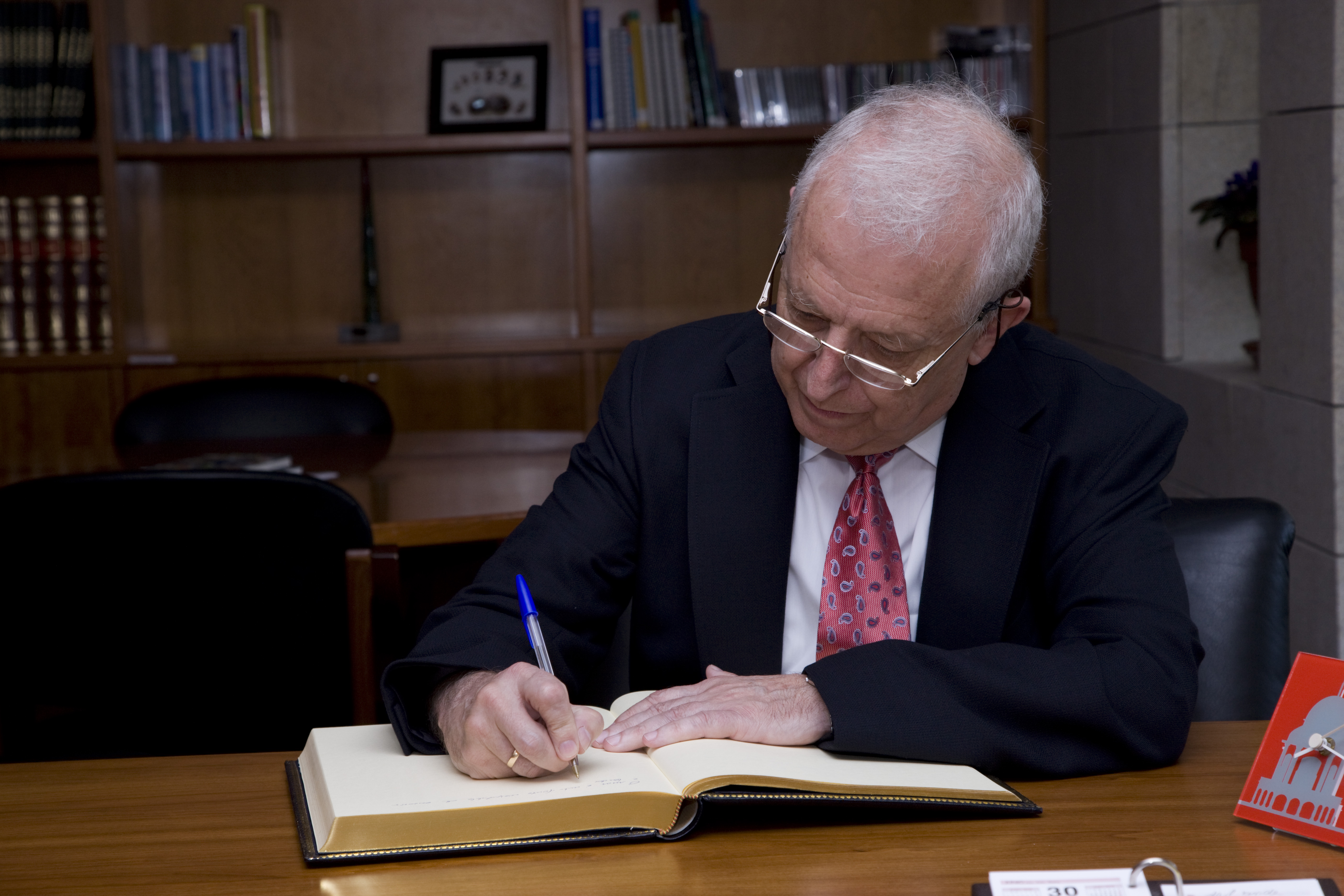 Francisco Díaz-Fierros, nado en Vilagarcía de Arousa o 4 de xullo de 1941, é un xeólogo e escritor galego. Na imaxe, realizada o o 4 de xullo de 2008, asinando o Libro de Ouro do Aquarium Finisterrae.